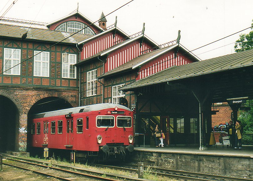 DSB S-tog FS 7292 at the station of Østerport in København, Danmark